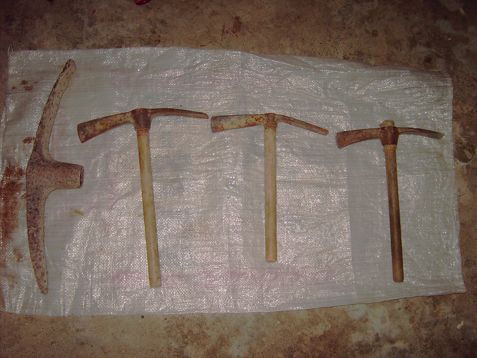 Una cabeza de pico comparada con una serie de piquetas.